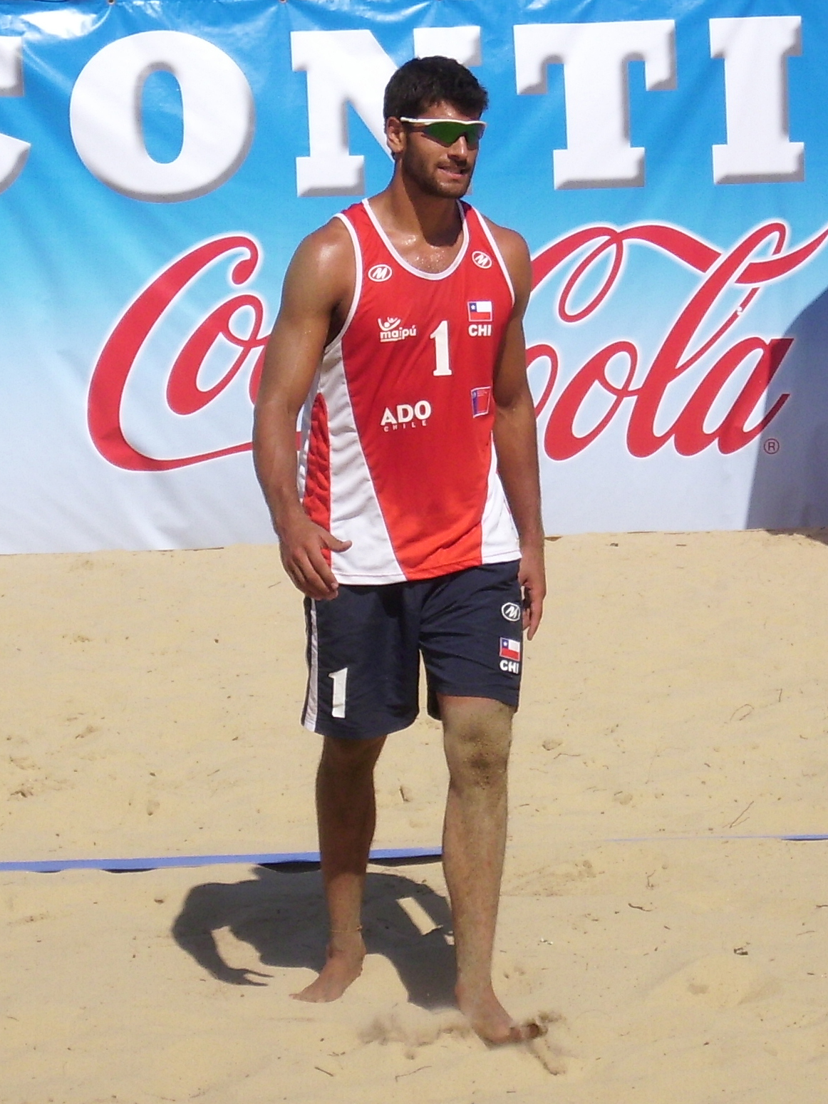 El voleibolista chileno Marco Grimalt durante uno de los partidos contra la selección brasileña en el Continental Cup, torneo de vóleibol playa clasificatorio para los Juegos Olímpicos de Londres 2012 que se realizó en la Plaza de Armas de Maipú (Santiago de Chile) entre el 24 y el 27 de noviembre de 2011.